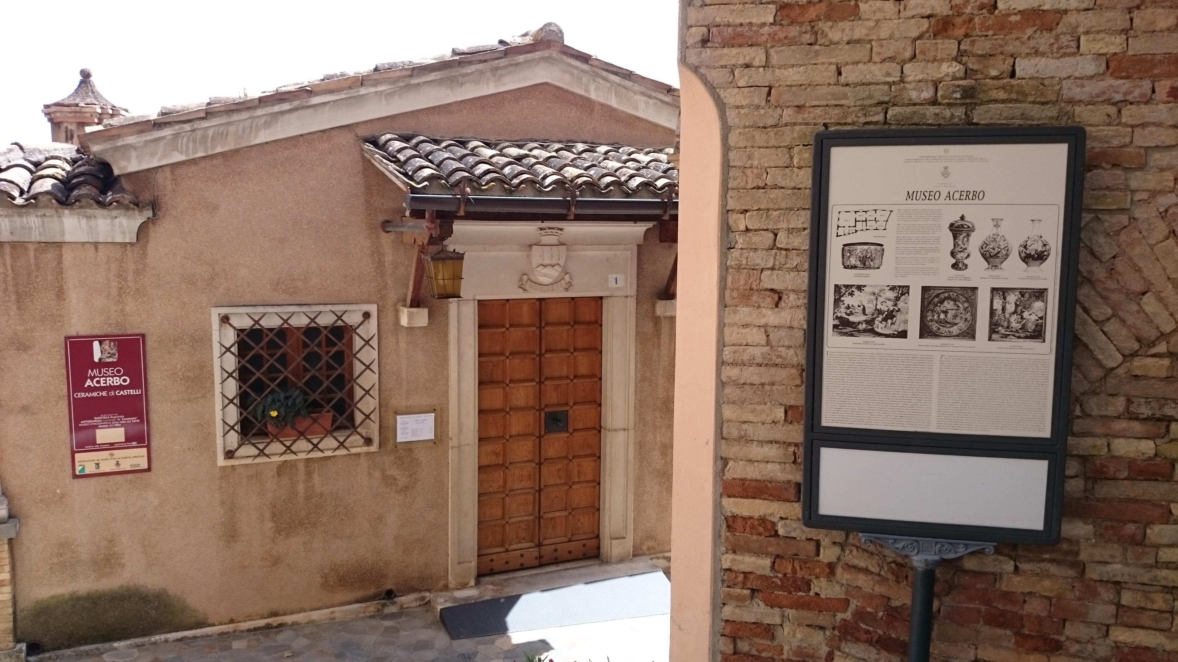 Loreto Aprutino